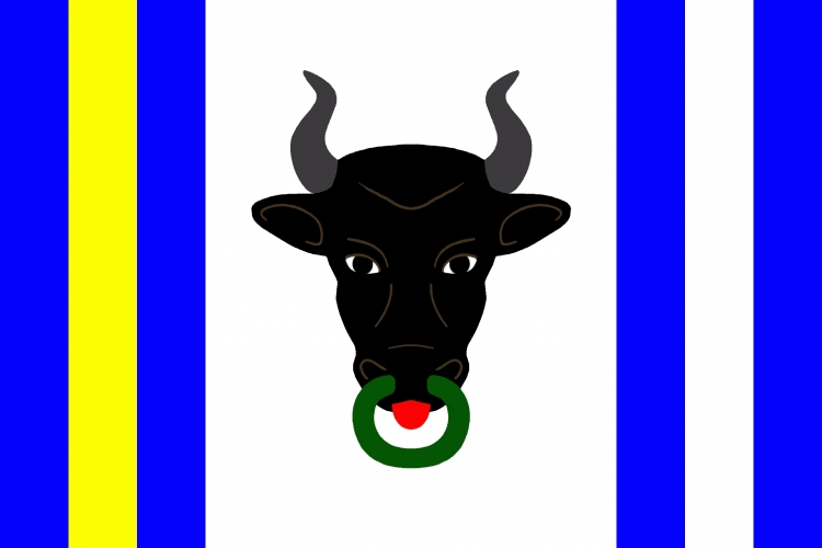 vlajka, Koroužné, okres Žďár nad Sázavou